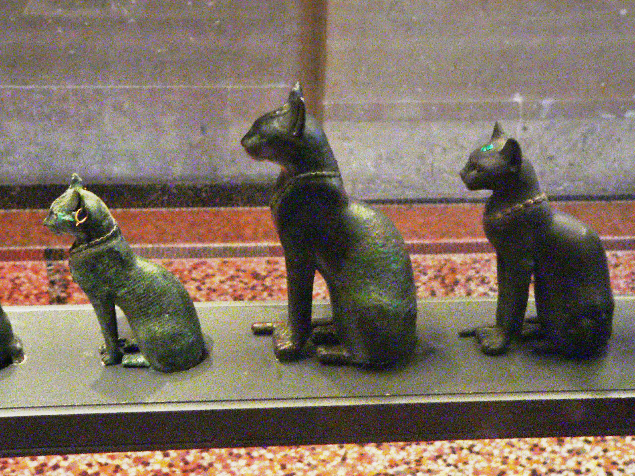 Statues de chattes. Troisième Période Intermédiaire et Basse Epoque.